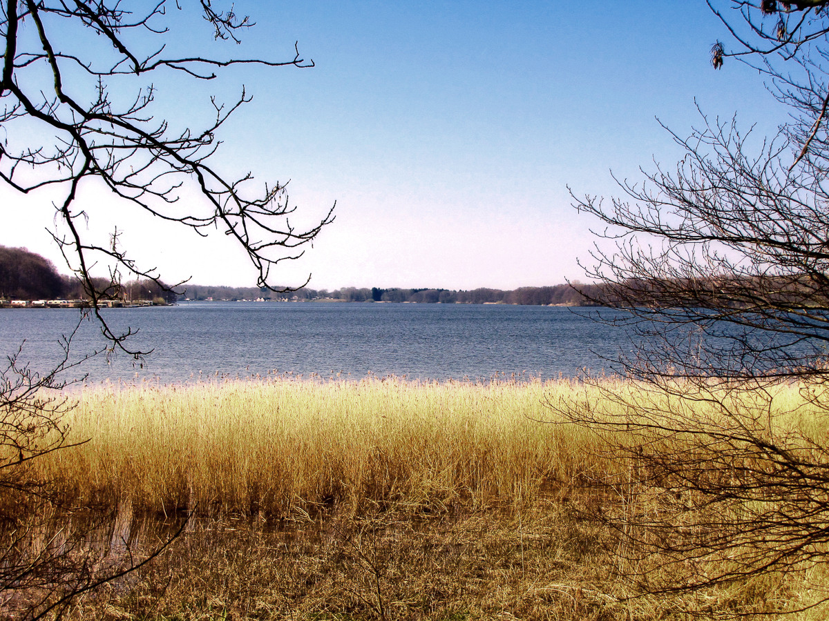 Blick über den Bistensee